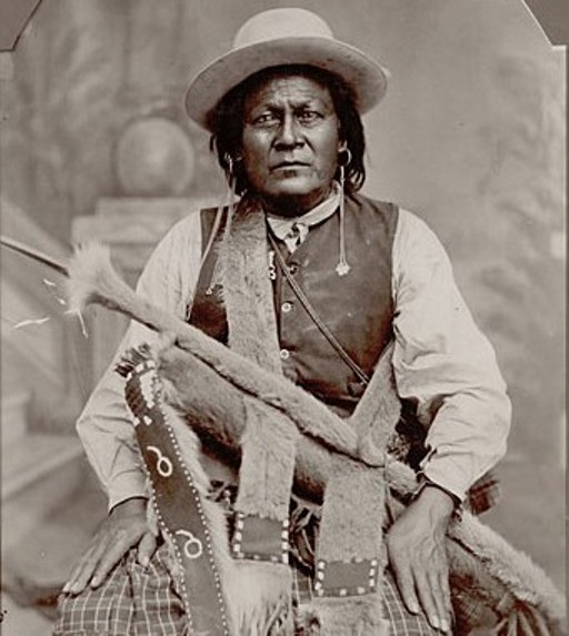 San Juan